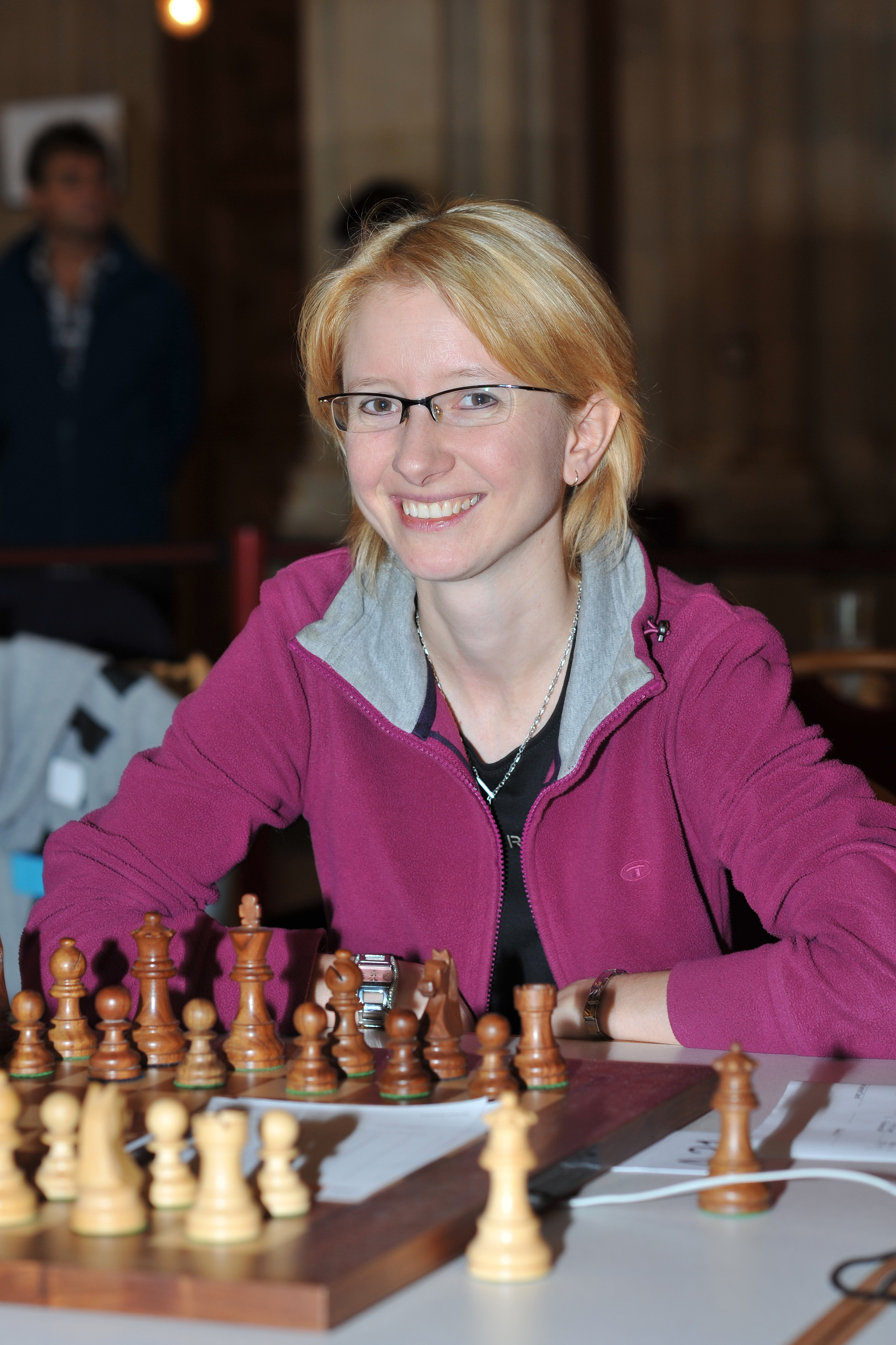 Vienna Chess Open 2013, A-Turnier: 8. Runde am 24. August 2013 - IM Eva Moser